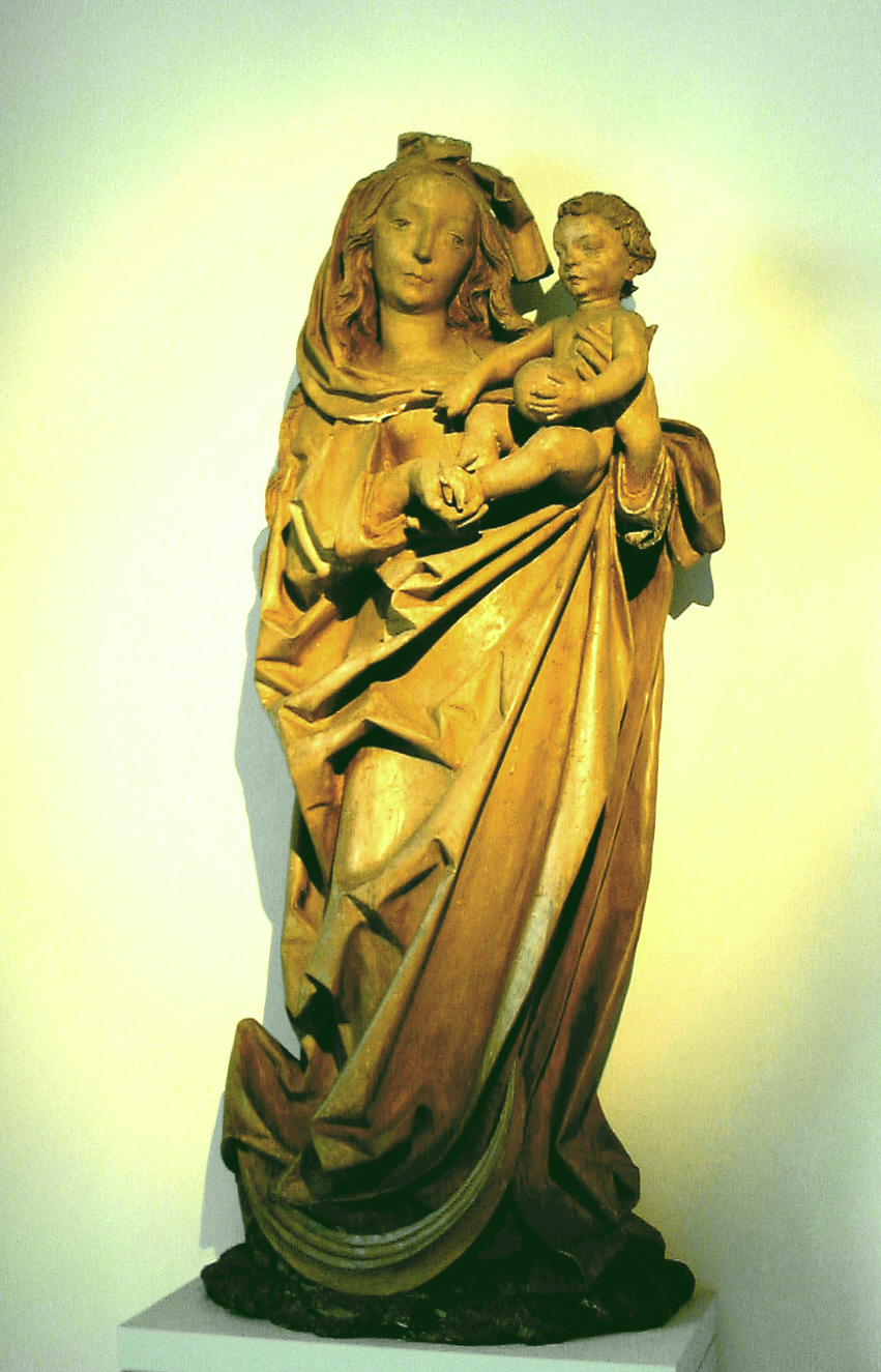 Madonna auf der Mondsichel, Nikolaus Gerhaerd von Leiden, 1470, zugeschrieben Sonstiges: Ausstellungsort Bischöfl. Diözesanmuseum Trier